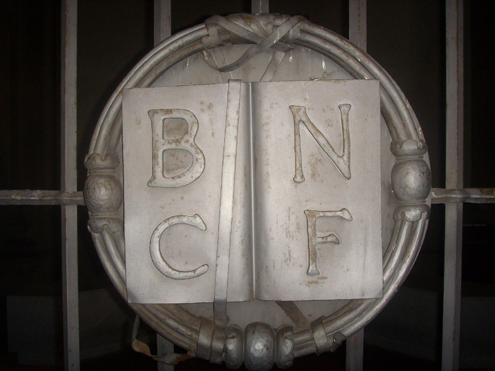 Simbolo della Biblioteca nazionale centrale nella cancellata di ingresso in Florence, italy